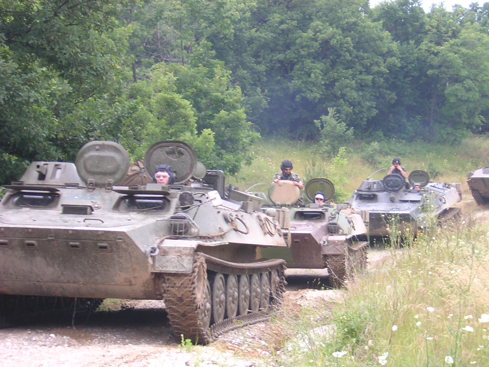 верижна колана